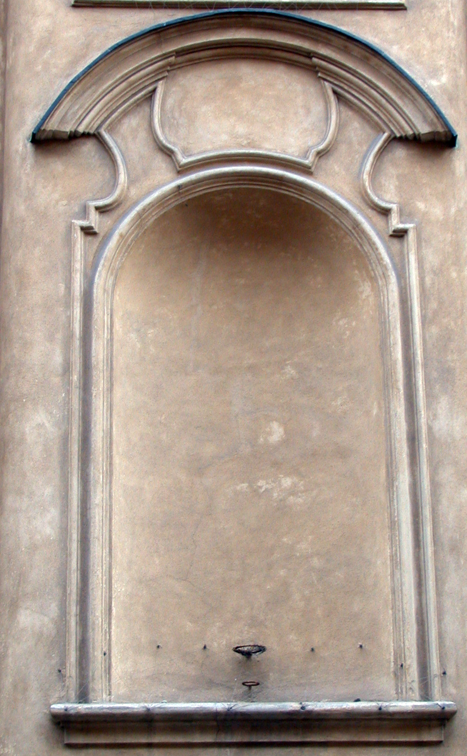 Varsavia, chiesa di San Martino (kóściół Św. Marcina), nella Città Vecchia (Stare Miasto), facciata sulla via Piwna (ulica Piwna), particolare della nicchia a sinistra del portale d'ingresso.